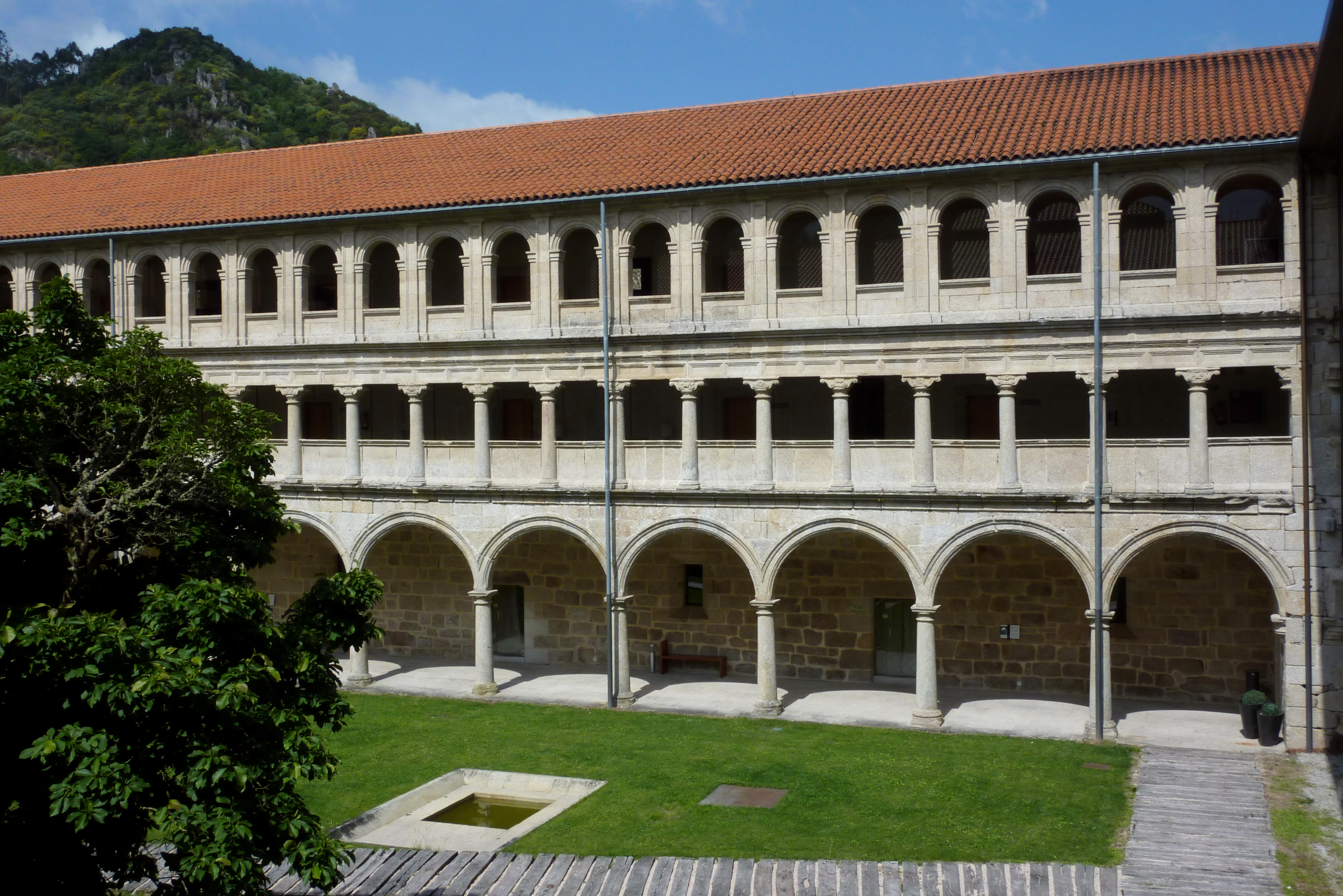 Ehemaliges Kloster Santo Estevo de Ribas de Sil (Nogueira de Ramuín) in der spanischen Provinz Ourense (Galicien), Kreuzgang de la Portería oder de los Caballeros (16./17. Jahrhundert)